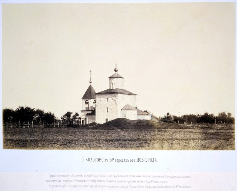 Volotovo Church near Novgorod (1352)